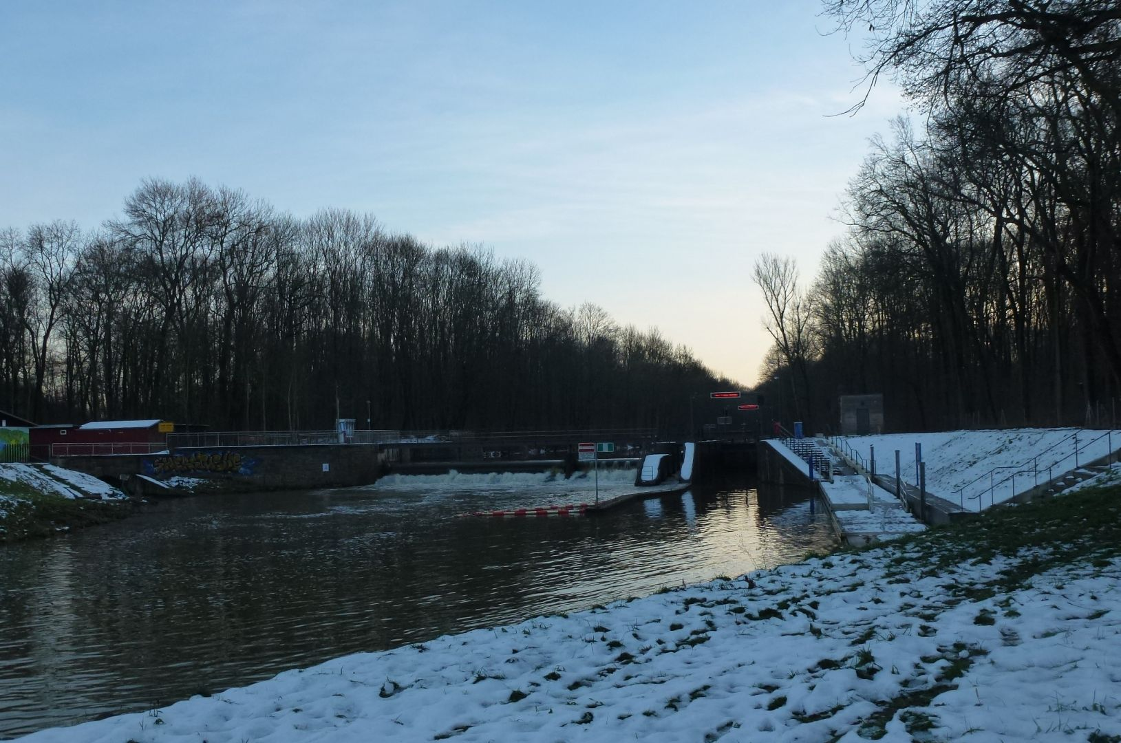 Connewitzer Wehr und Schleuse